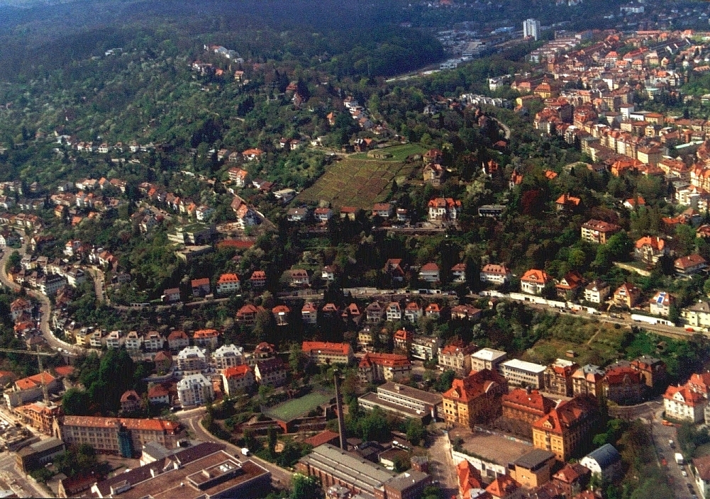 Stuttgart Heslach von einem Sportflugzeug aus aufgenommen - mit unserem Schickhardt Gymnasium im Vordergrund und den als Höhenlinien erkennbaren Straßen: Gebelsbergstraße, Wannenstraße (über dem Schwabtunnel), und der Hohentwielstraße mit unserem Elternhaus in "HHL" und der sich in Bildmitte in die Rebenreute (Anfahrt zum ehem. Haltepunkt Heslach der Gäubahn - im Volksmund auch "Panoramabahn") teilt, und entlang des "Grates" des Hasenberges die Hasenbergsteige hinauf zum (Überrest) des Hasenbergturmes mit dem Höhenrestaurant Waldhaus und dem Ausblick auf die Gäubahn/ Haltepunkt Heslach; im Hintergrund die Hasenbergsteige die Stuttgart Süd/ Heslach vom Stuttgarter Westen im rechten Hintergrund trennt; das war meine "heile Welt" über 30 Jahre: von 1961-bis Mitte der 90er Jahre, als im Ländle die Welt noch heile war, ohne S-21 und Feinstaub Debatten - Those were the days !